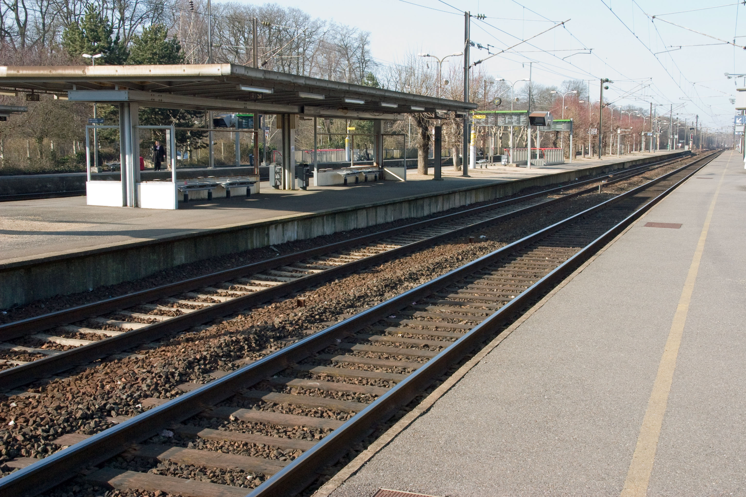 Gare d'Orry-la-Ville - Coye, Orry-la-Ville, département de l'Oise (France)